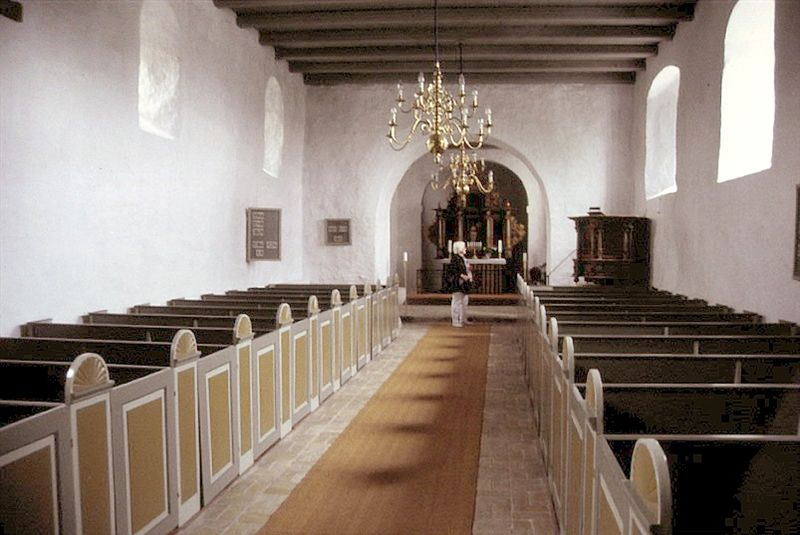 Tånum Kirke, Randers Kommune, kirkerummet set mod øst